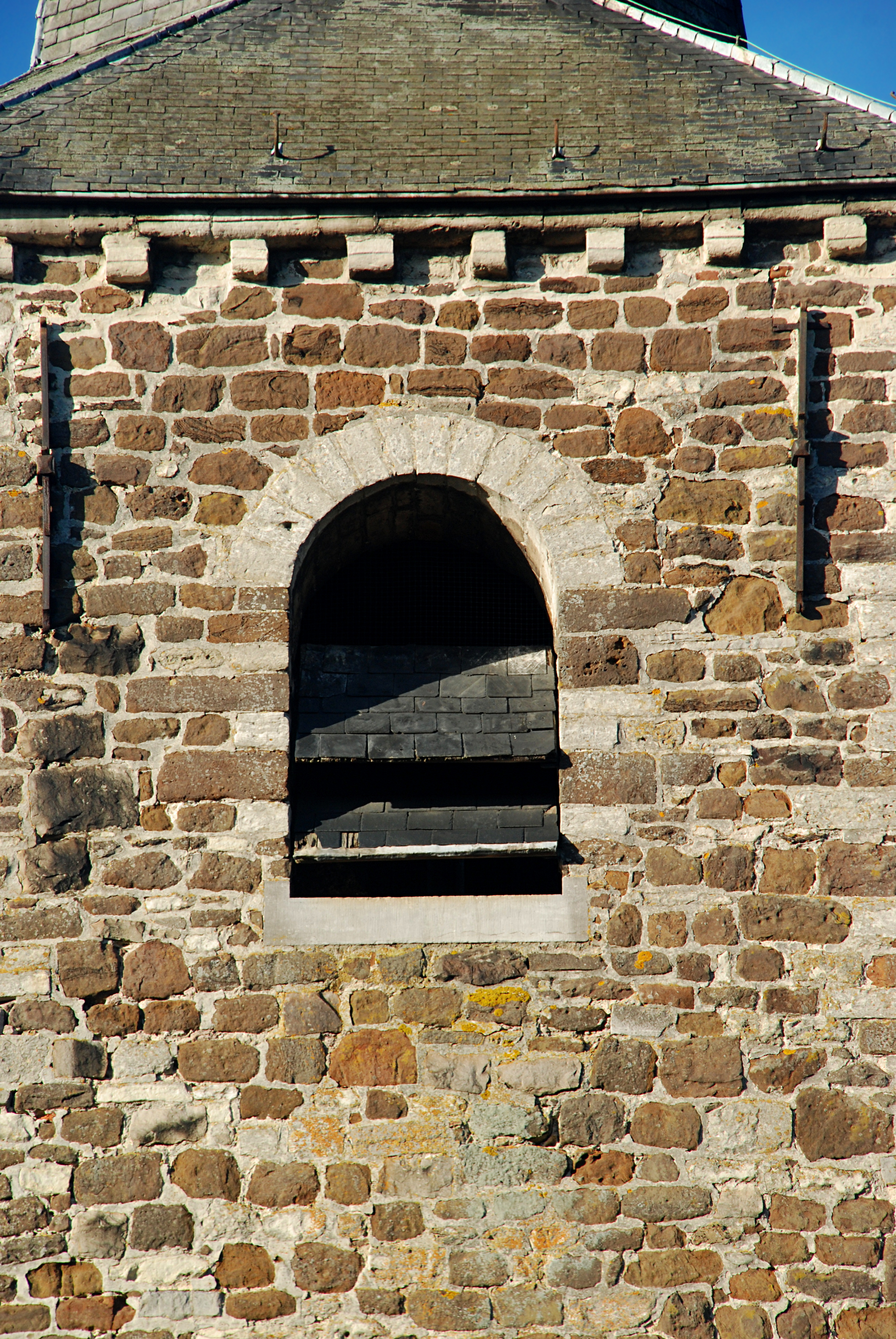 Belgique - Brabant wallon - Chaumont-Gistoux - Église Saint-Bavon de Chaumont